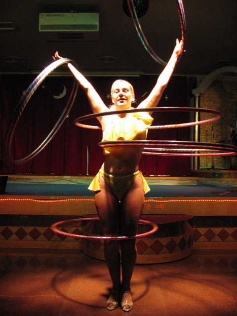 台灣遊 Oct 2004 - 142: 東山樂園